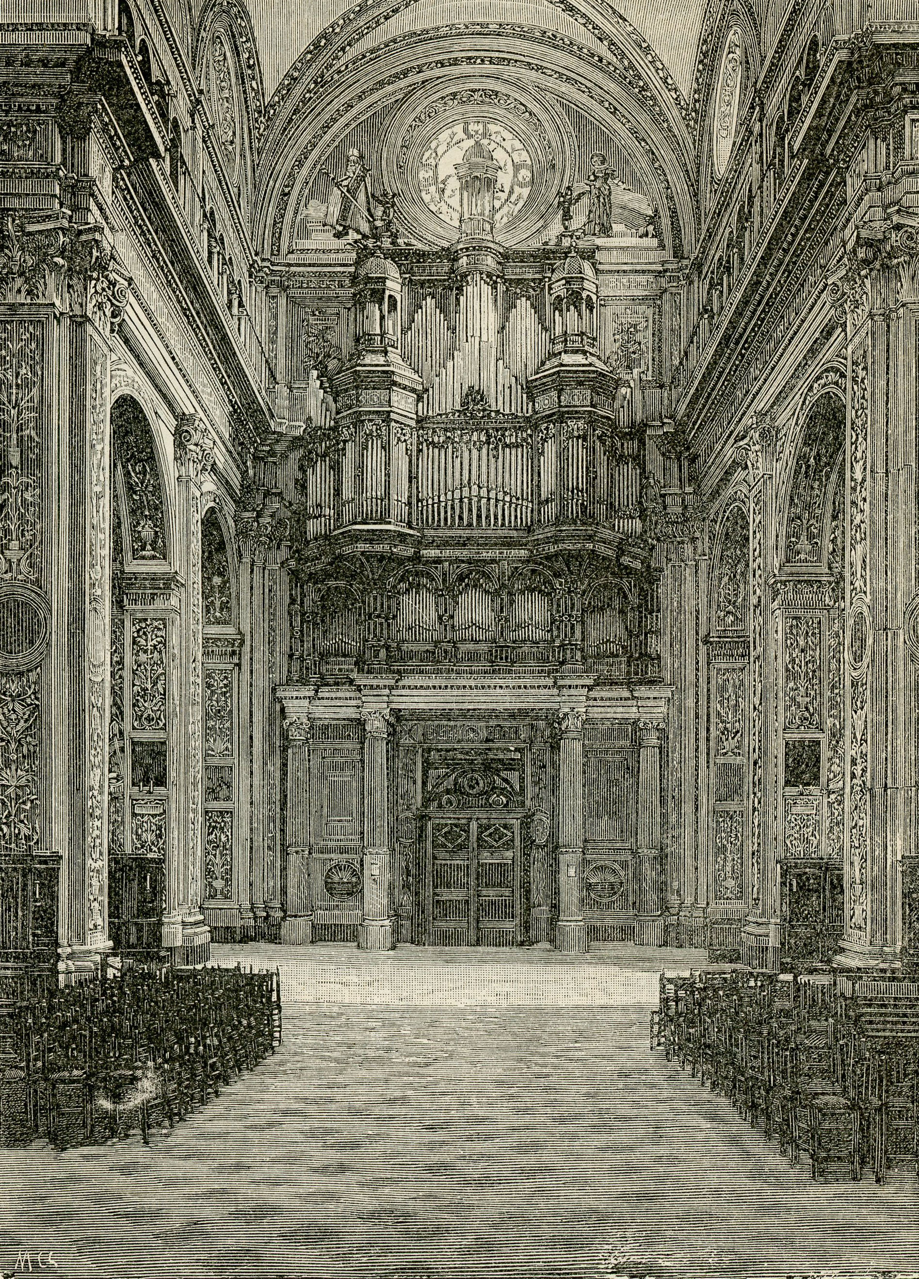 Genova: organo elettrico Trice nella chiesa di N.S. dell’Immacolata (xilografia).